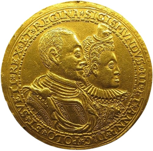 Monogramma R., sigismondo III di polonia e anna, oro, 1598